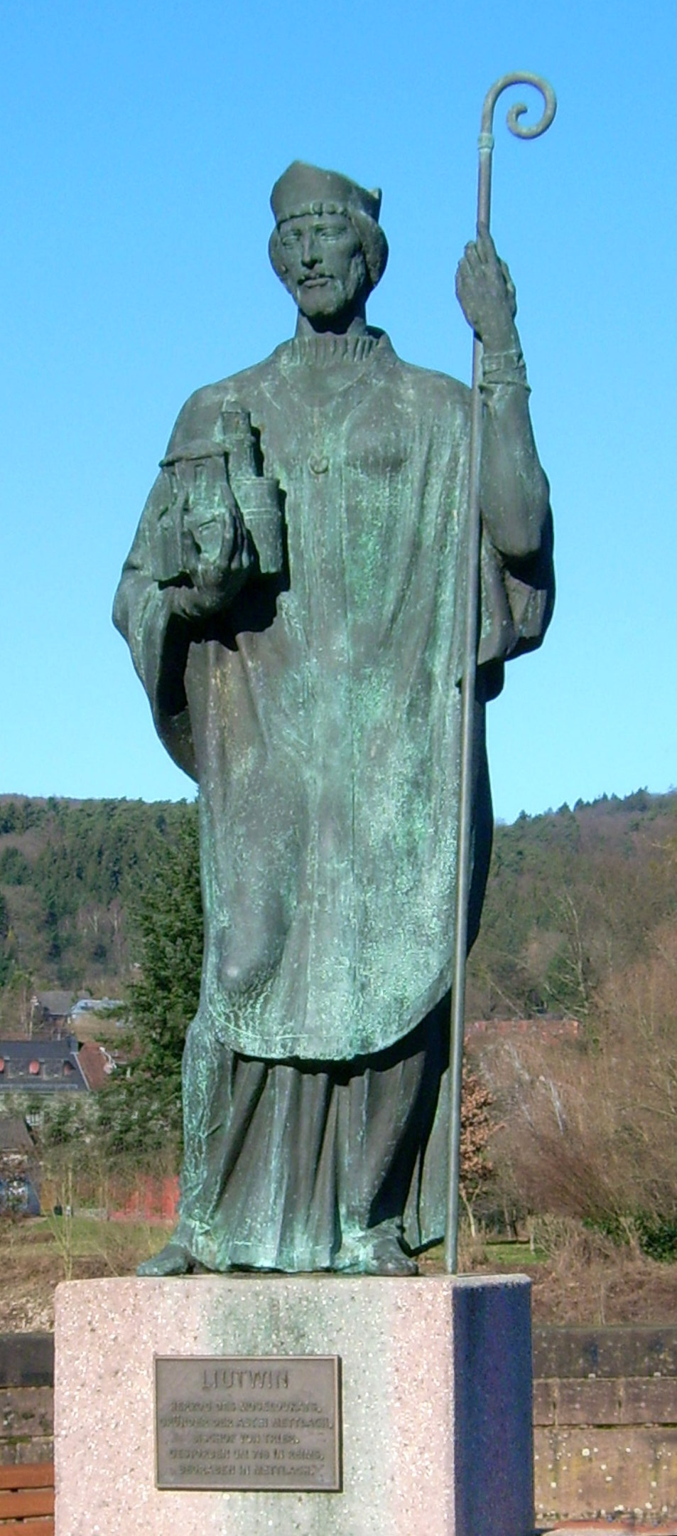 Mettlach Bischof Liutwin von Trier Herzog